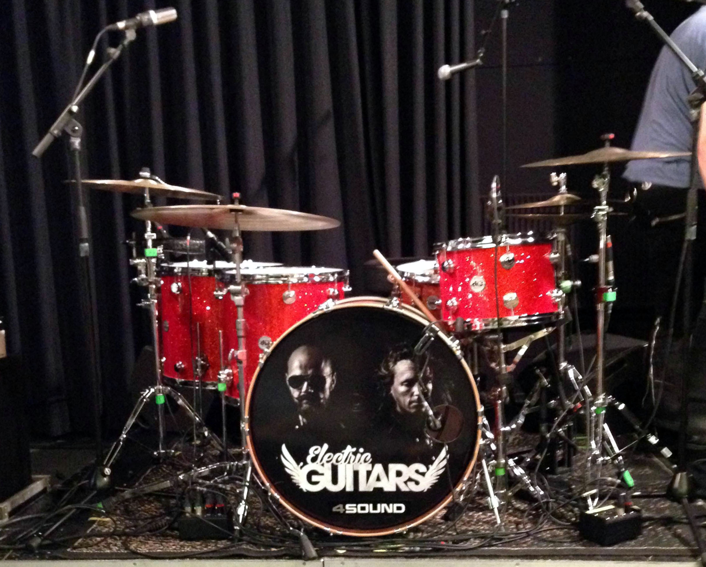 Trommeslager Morten Hellborns setup under Electric Guitars koncerter i 2013.